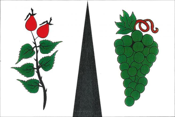 Trnovany, okres Litoměřice, vlajka